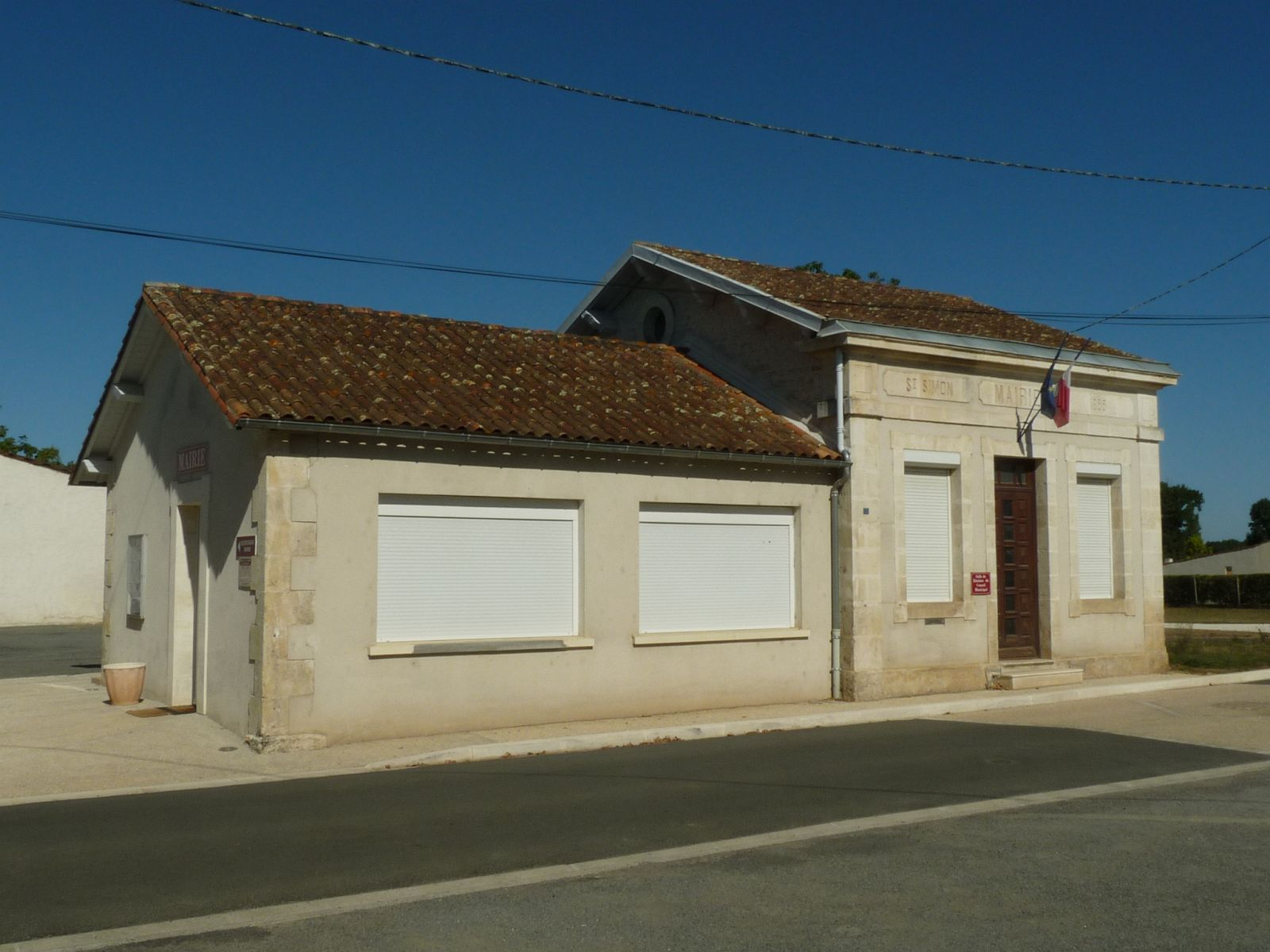 mairie de Saint-Simon-de-Pellouaille (17), France